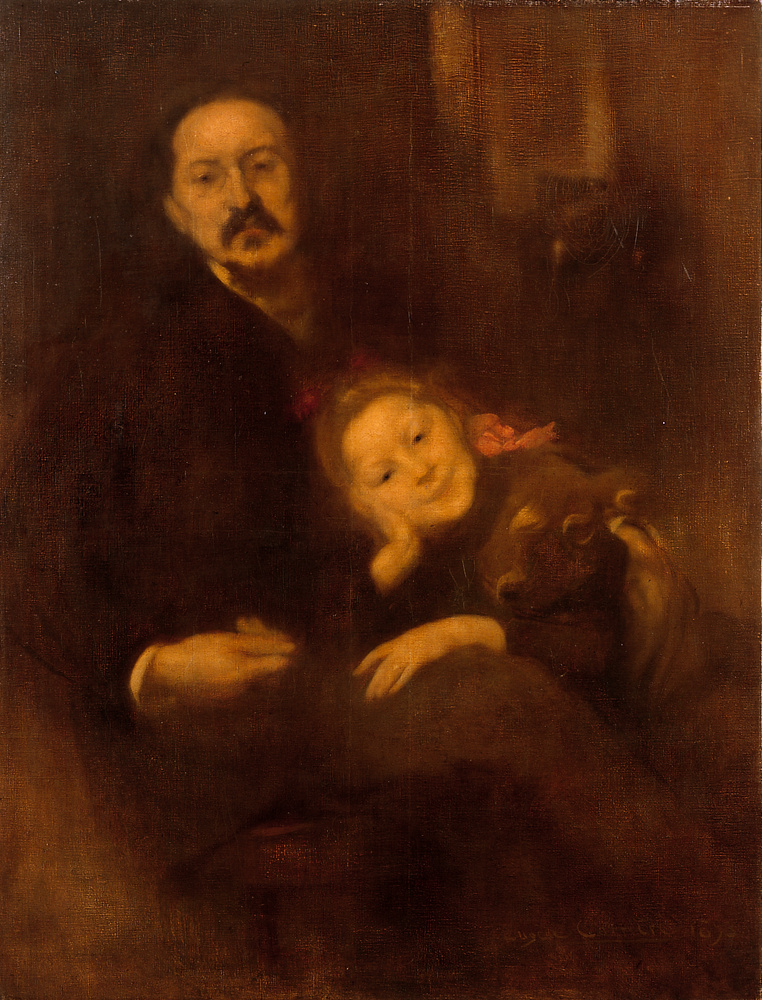 Gabriel Seailles e la figlia Andrée